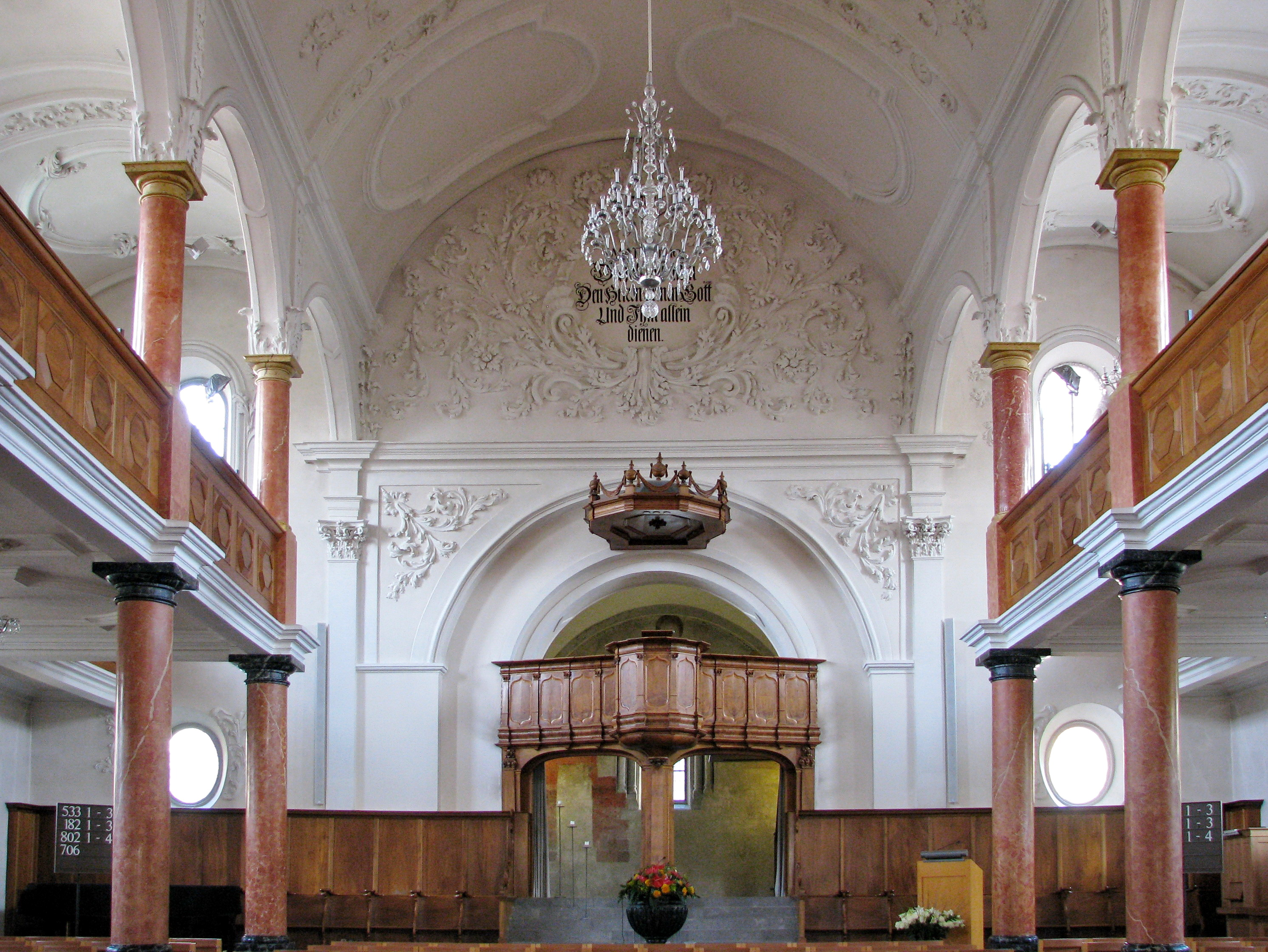 St. Peter Church in Zürich (Switzerland) as seen from St. Peterhofstatt